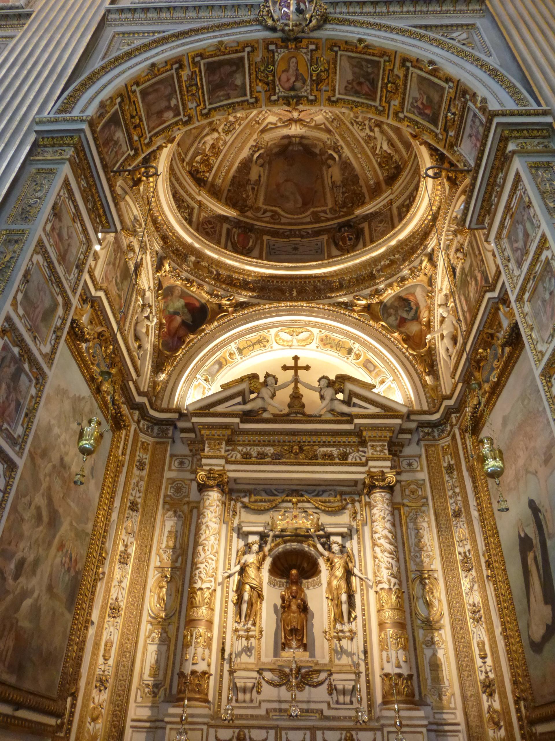 Roma, S. Maria in Monserrato. Cappella della Madonna di Montserrat